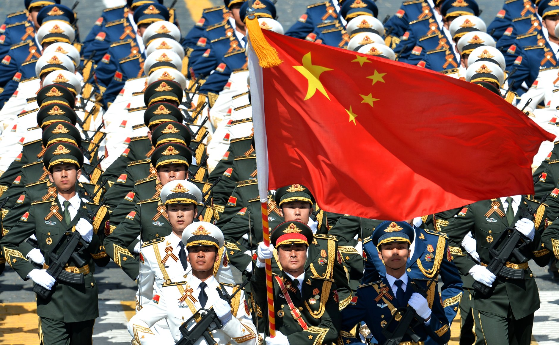 Военнослужащие Народно-освободительной армии Китая во время военного парада в ознаменование 70-летия Победы в Великой Отечественной войне 1941–1945 годов.